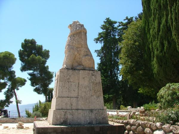 פסל הארי השואג של הפסל אברהם מלינקוב הוצב בתל חי בשנת 1928 לזכר 8 הנופלים בקרב תל חי בי"א באדר תר"פ 1920